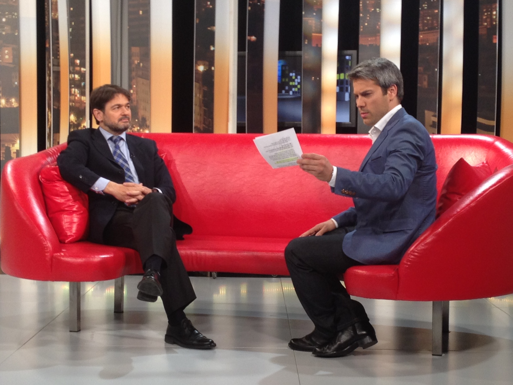 Oriol Pujol al progama La Rambla de BTV